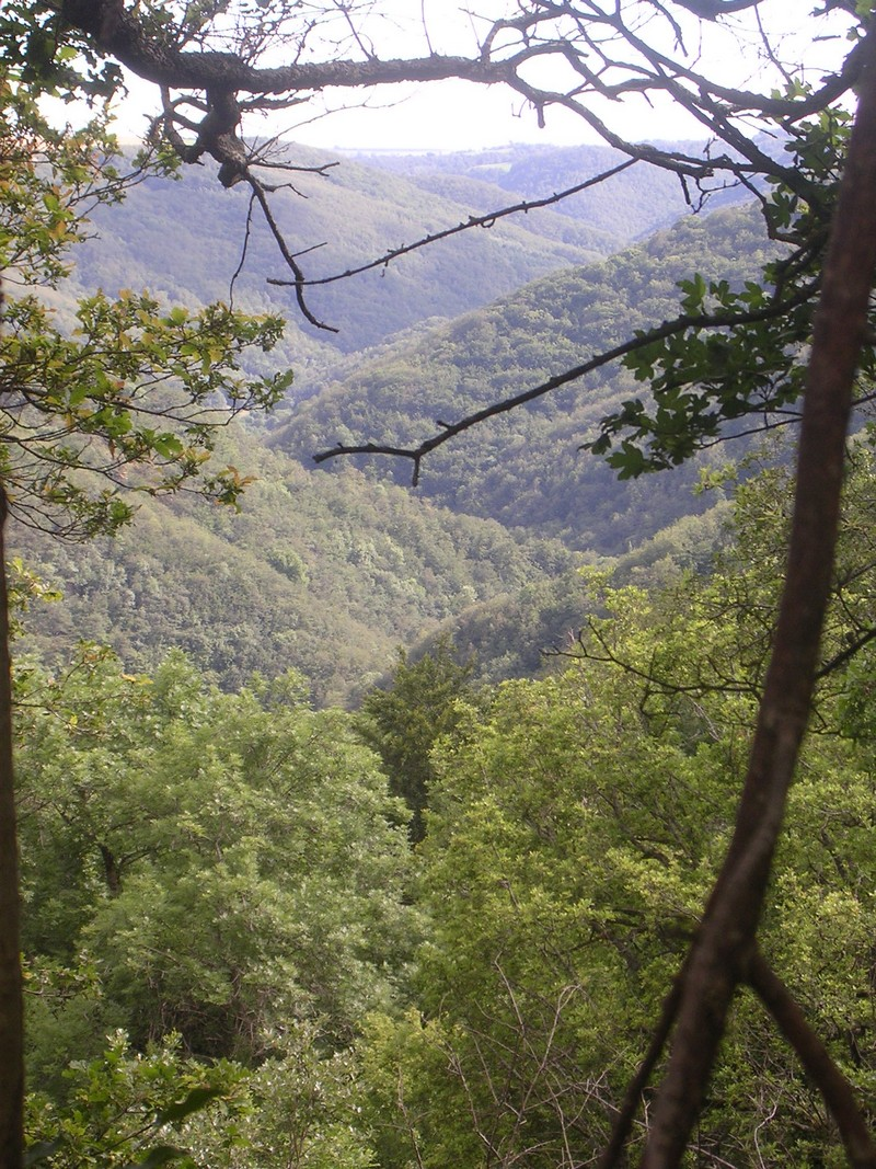 Vallé de l'Arcueil avant Bonnac